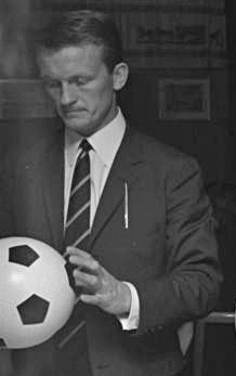 Staatsmin. Heubl, Bayer. Landesvertretung, empfängt die Fußballmannschaft Bayern-München (Europa-Cup-Sieger)